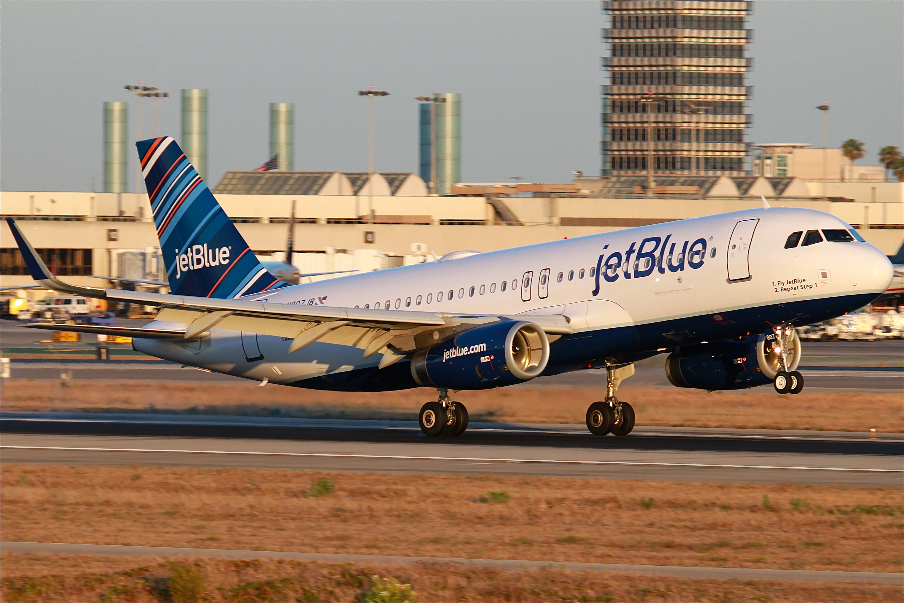 LAX